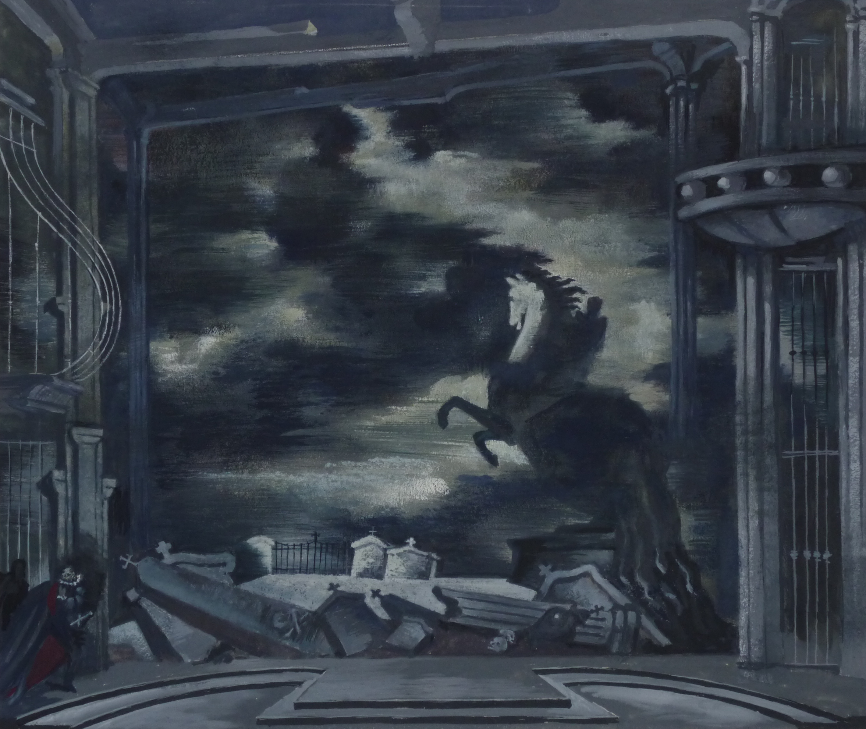 Bühnenbildentwurf von Helmut Jürgens für "Don Giovanni" von W. A. Mozart, 2. Akt, Aufführung München 1949